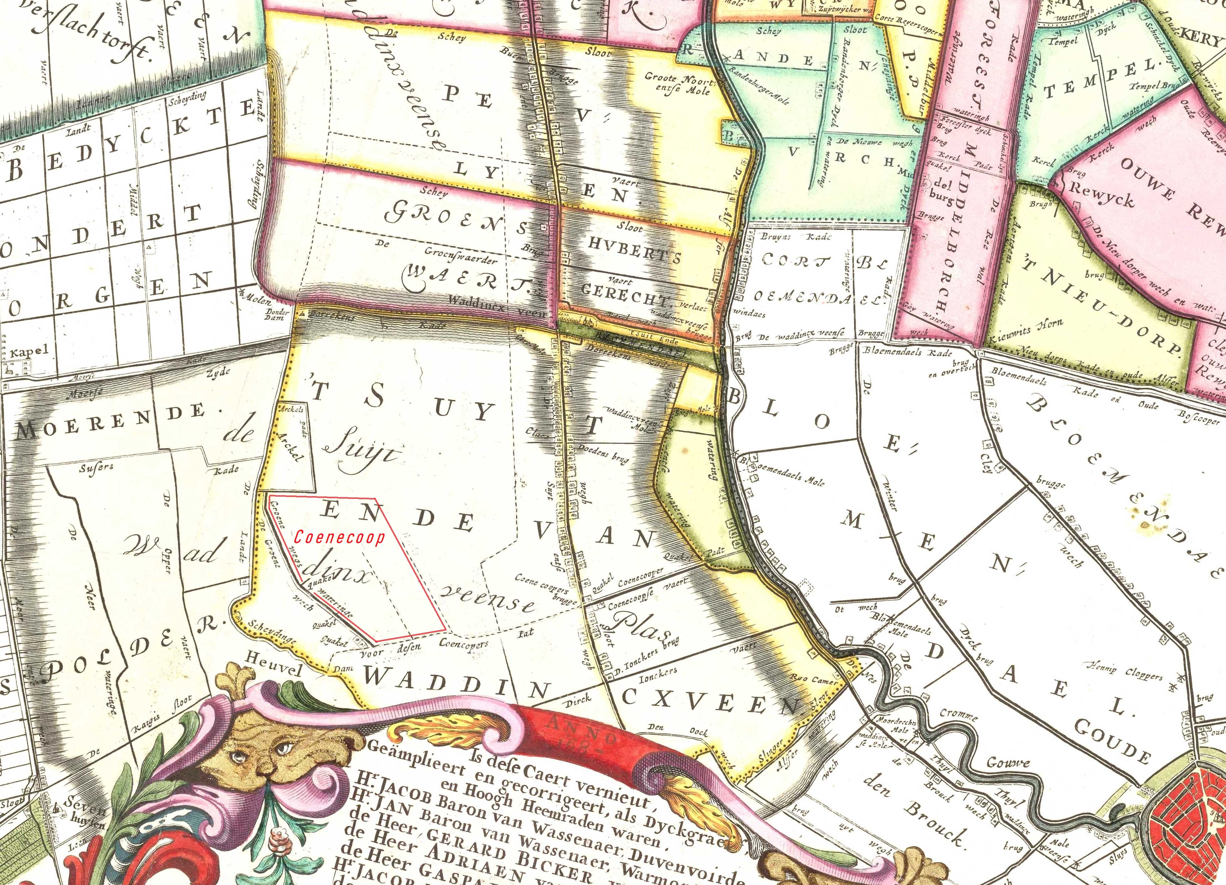 Situering van het voormalige perceel Coenecoop